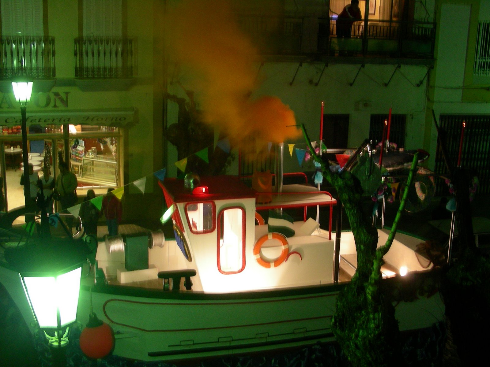 Entierro de la Sardina en Isla Cristina, paseo de los Reyes